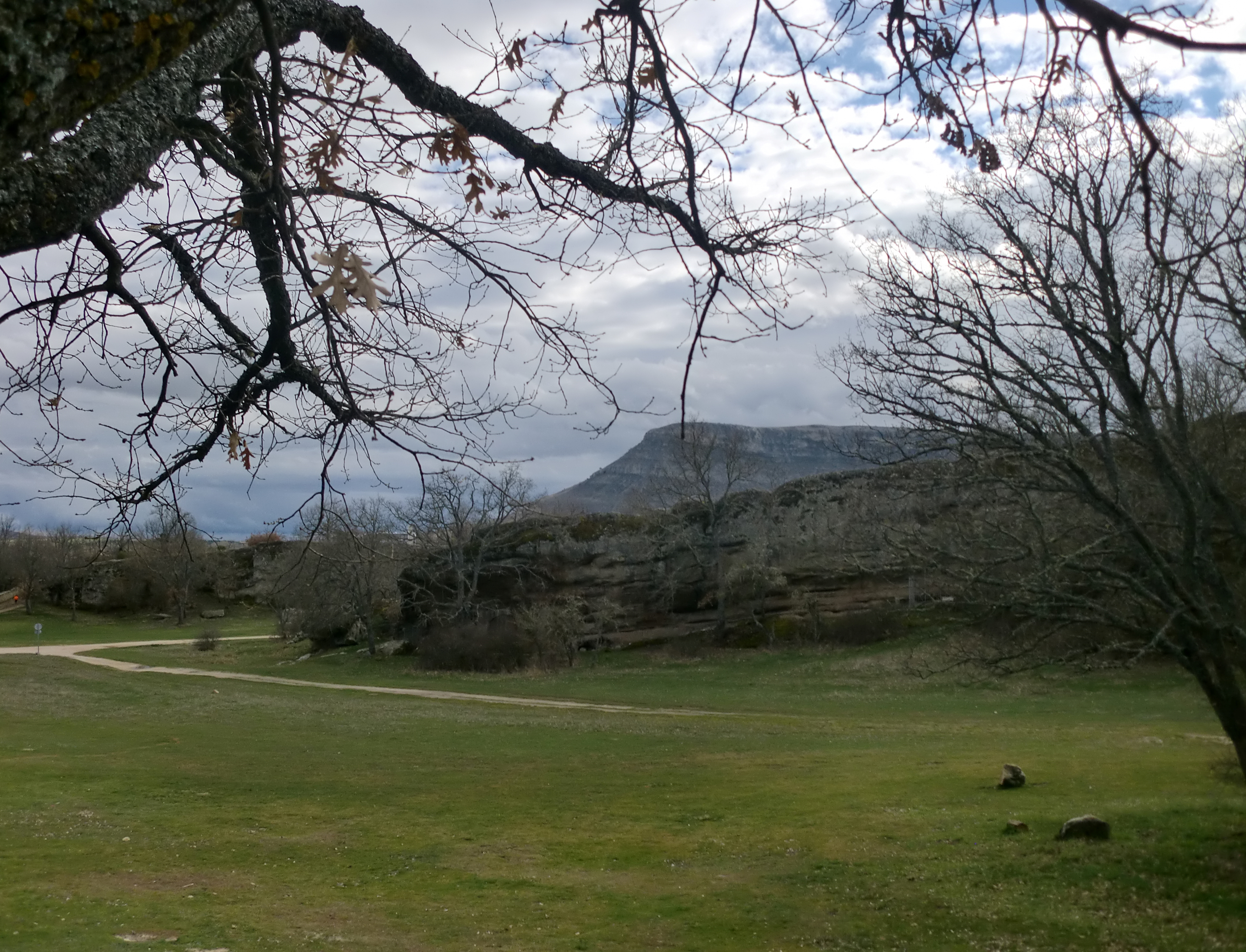 Paraje de Valonsadero (Soria), al fondo "Pico Frentes" en el que se ubican las 35 estaciones de pinturas rupestres